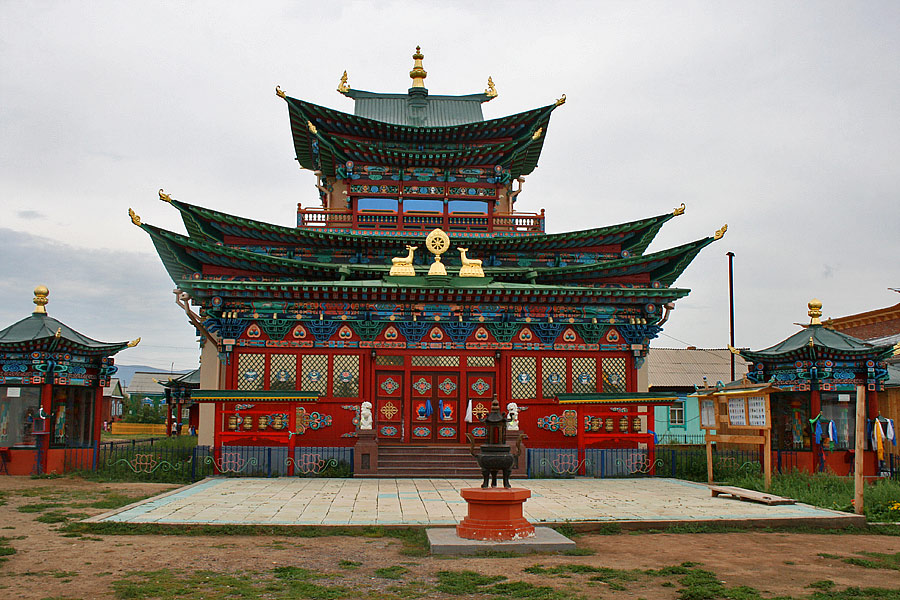 Ivolga Datsan